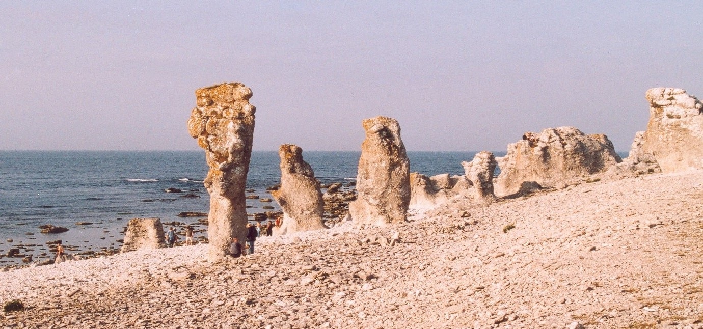 Rauksteine auf Gotland